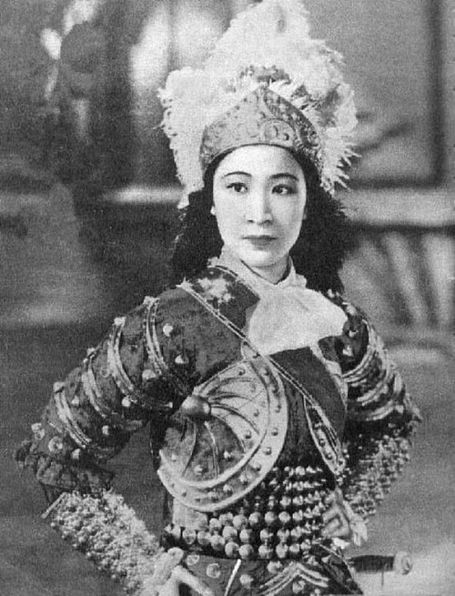 中国合众影片公司于1940年出品电影《香妃》剧照，王熙春饰香妃。满洲国电影画报《电影》昭和15年（1940年）初版曾用作封面。